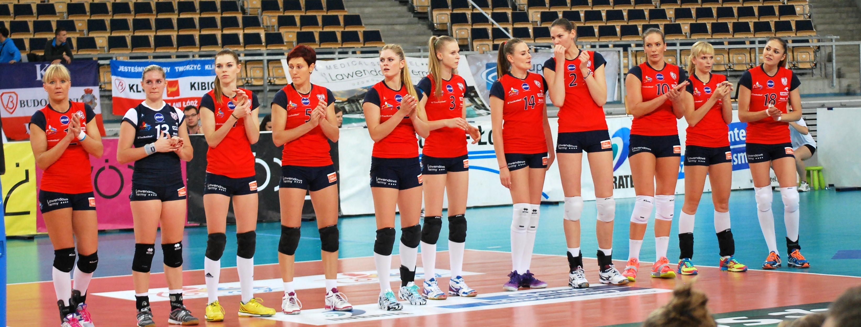 Budowlani Łódź w sezonie 2014-15